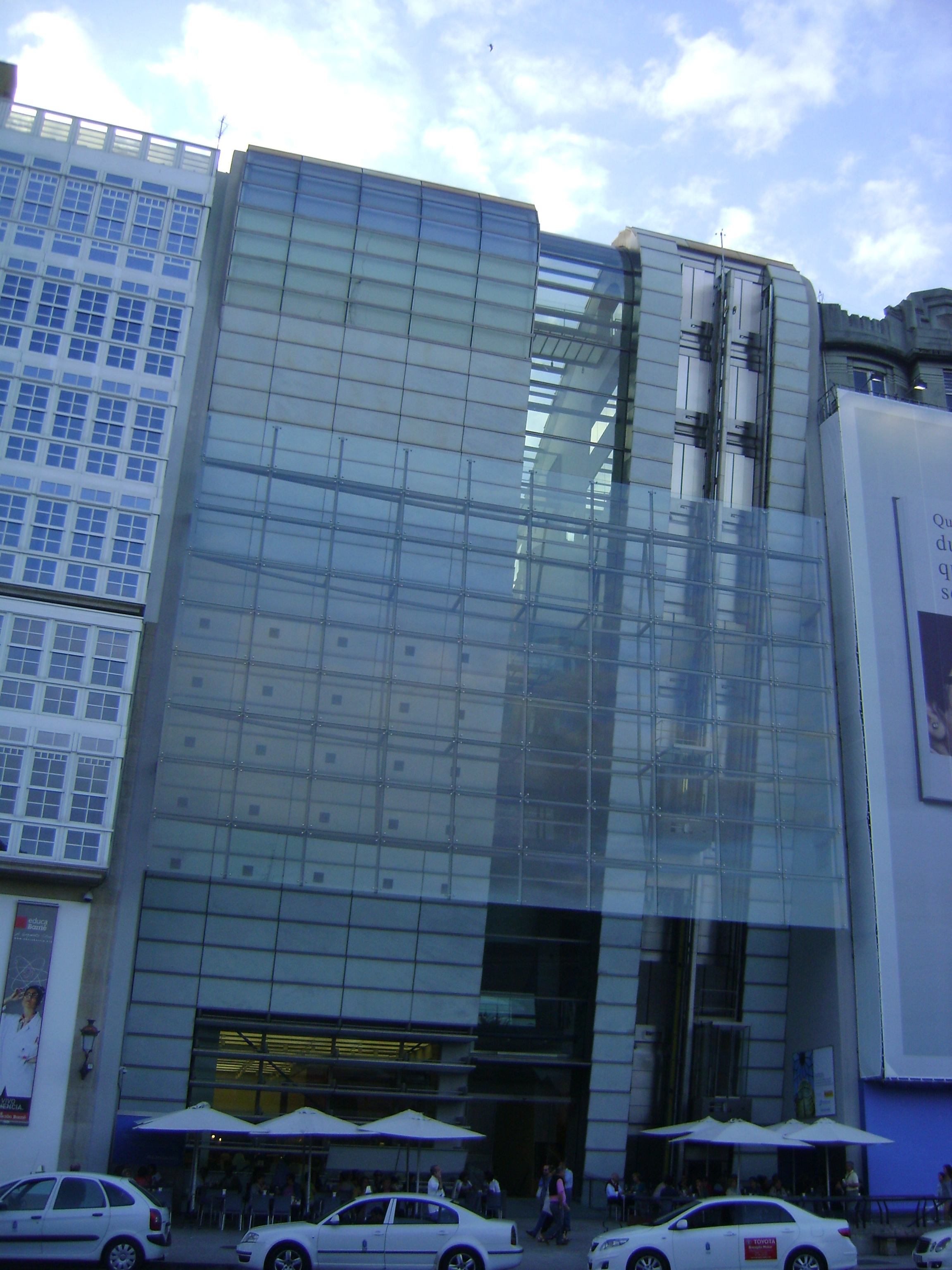 Edificio de la Fundación Abanca, La Coruña.